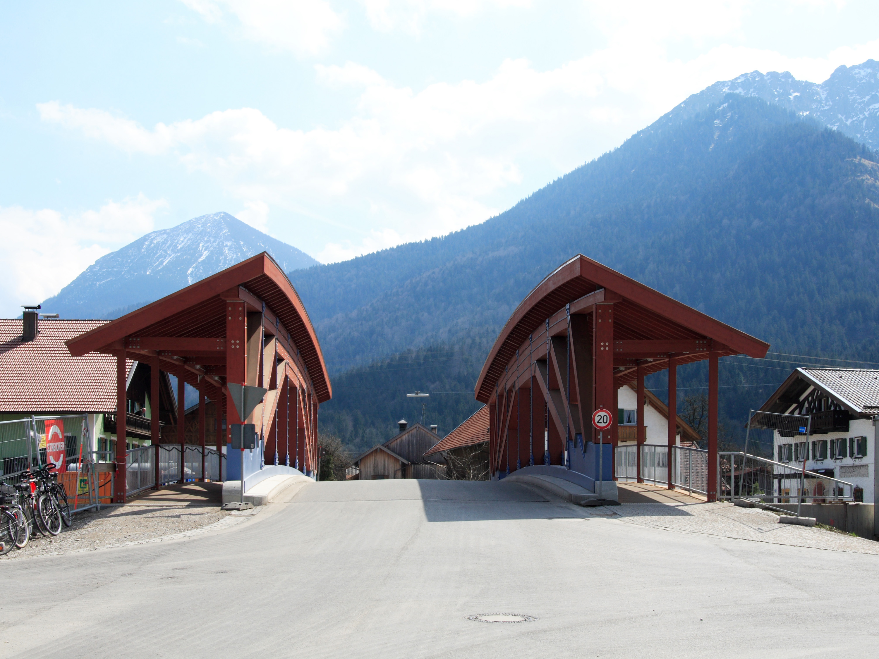 Die neue Brücke in Eschenlohe, Landkreis Garmisch-Partenkirchen